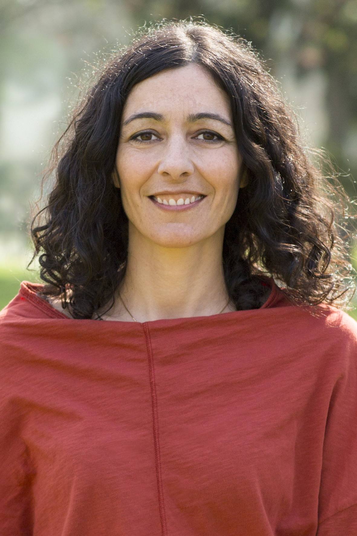 Sandra Krautwaschl Grüne Steiermark